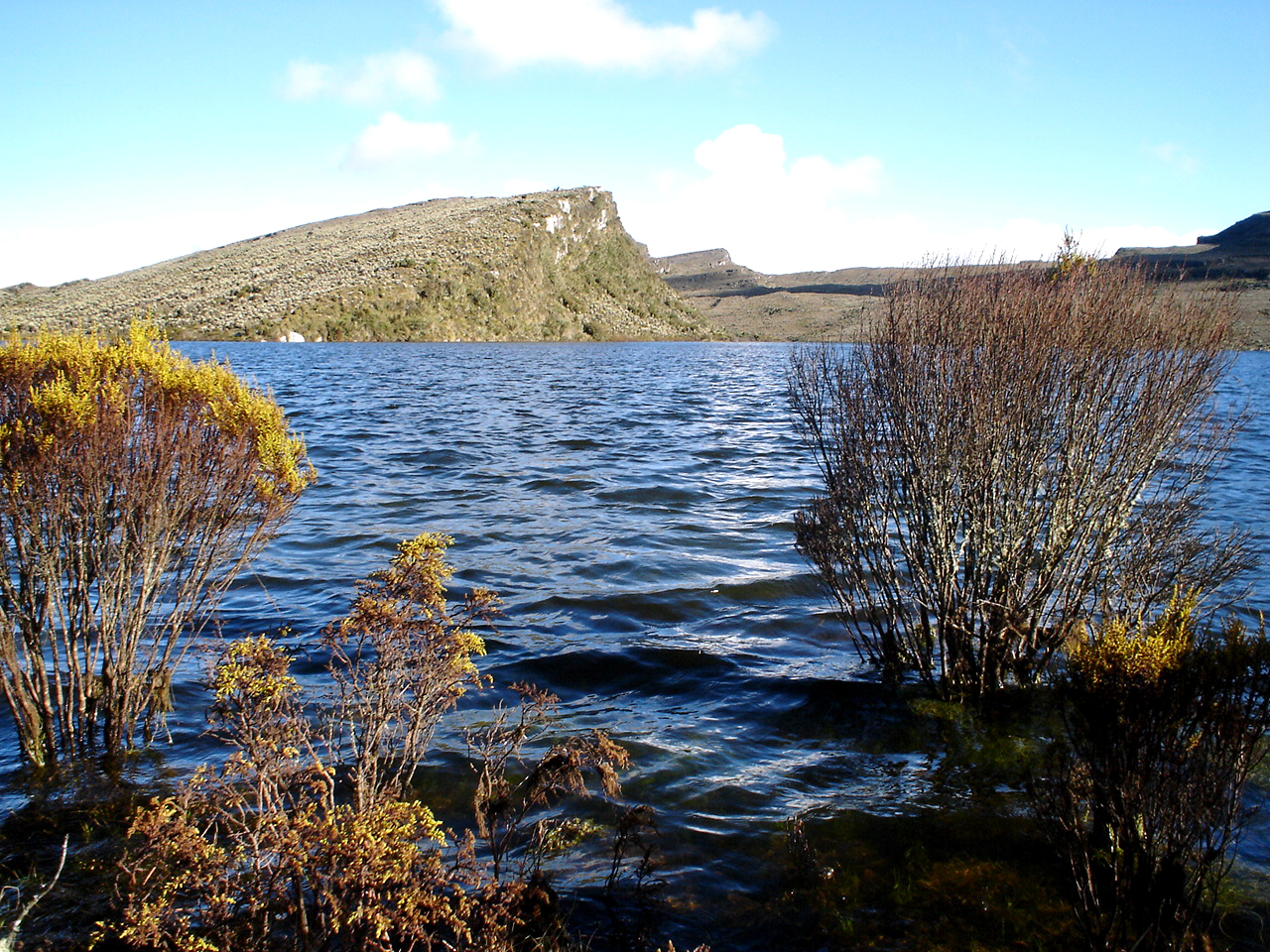 Laguna de Chisacá en el Páramo de Sumapaz